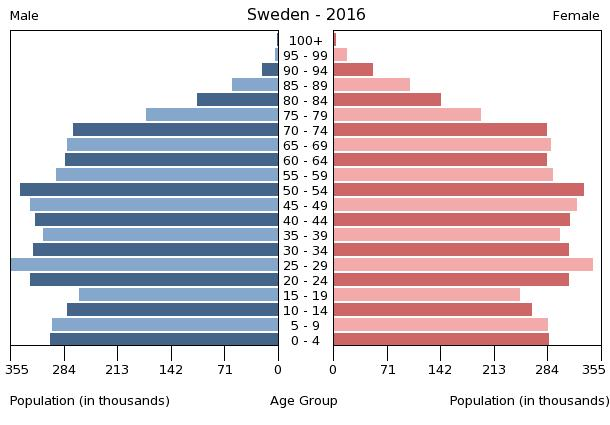 Demografie Schwedens